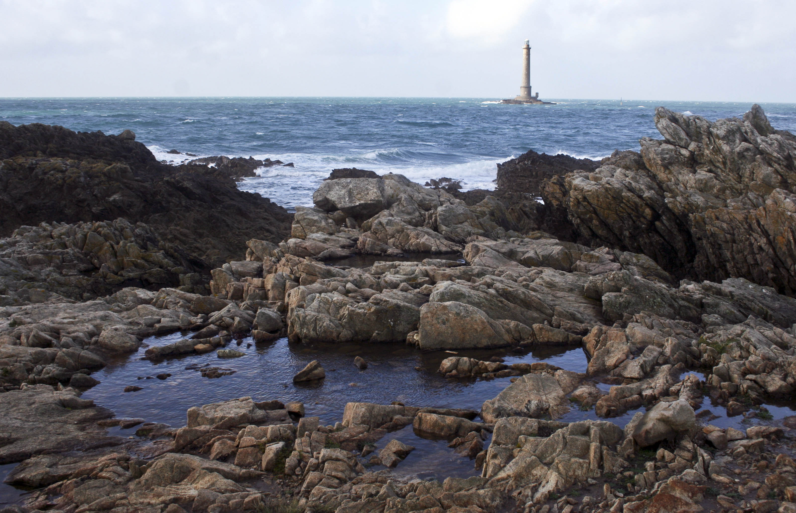 Cap de la Hague, phare de Goury (Manche)